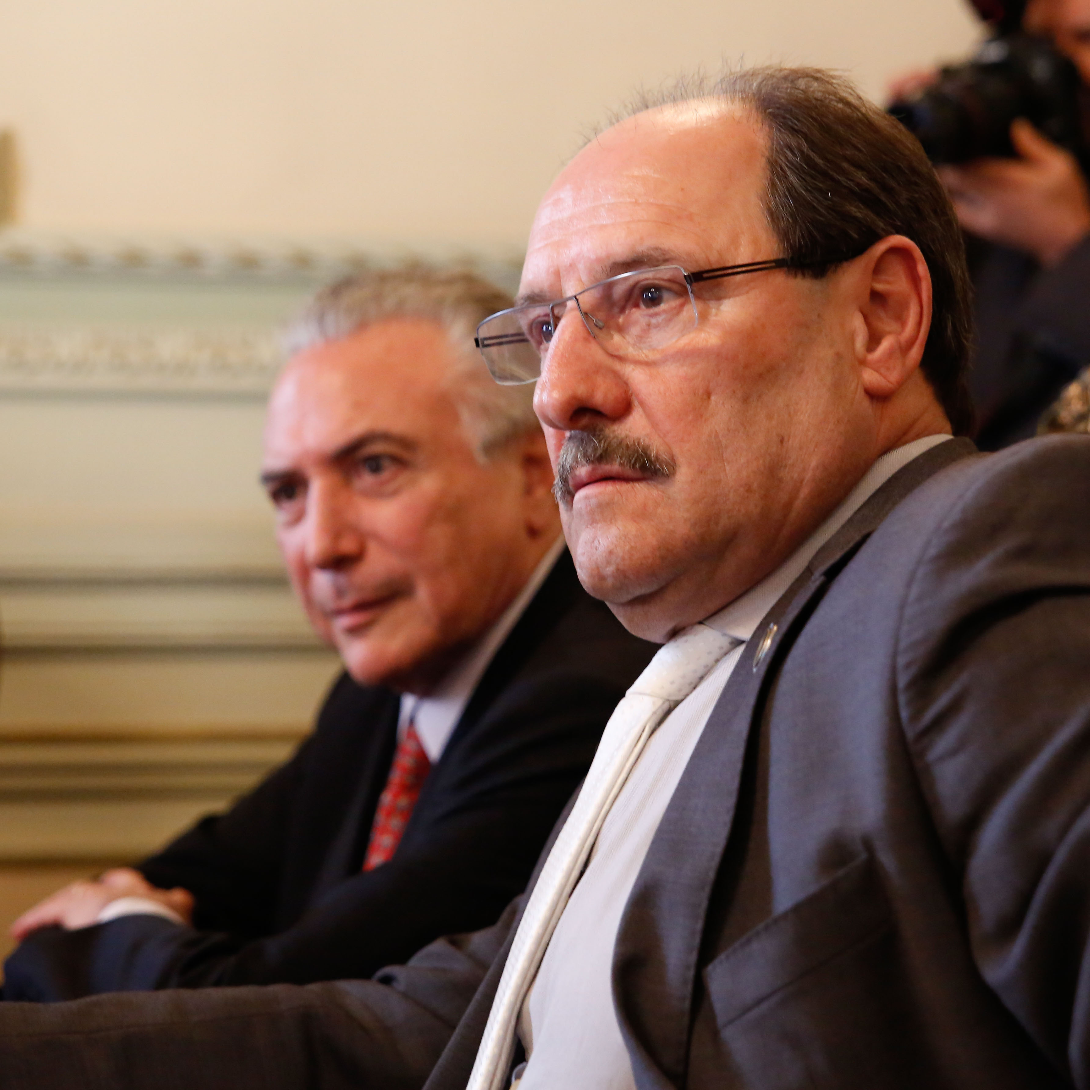 Presidente em exercício, Michel Temer, visita José Ivo Sartori, Governador do estado do Rio Grande do Sul e parlamentares do PMDB.